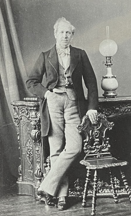 Князь Николай Иванович Трубецкой (1807—1874)